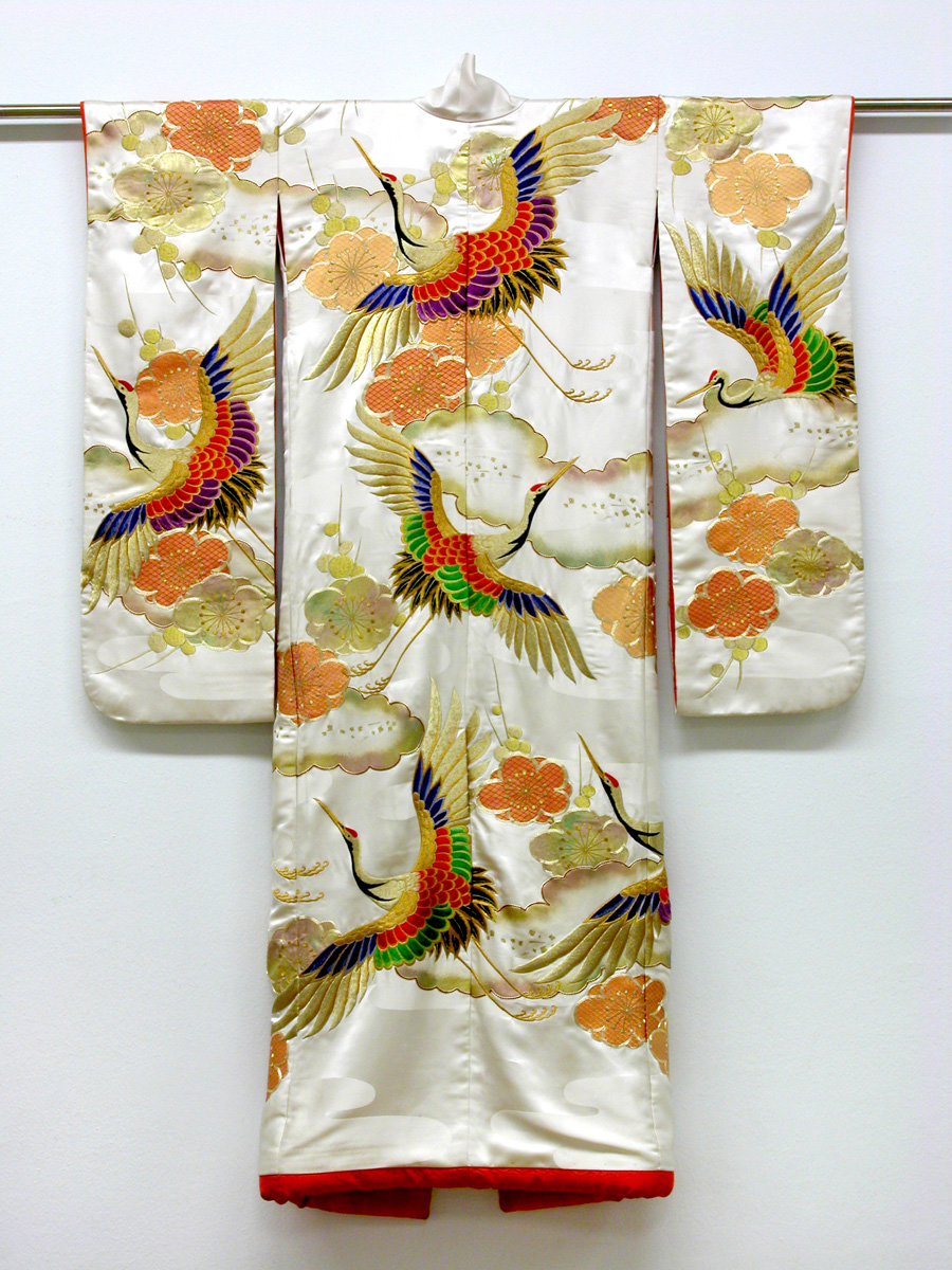 Япония